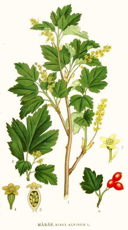 Original Description Måbär, Ribes alpinum L.